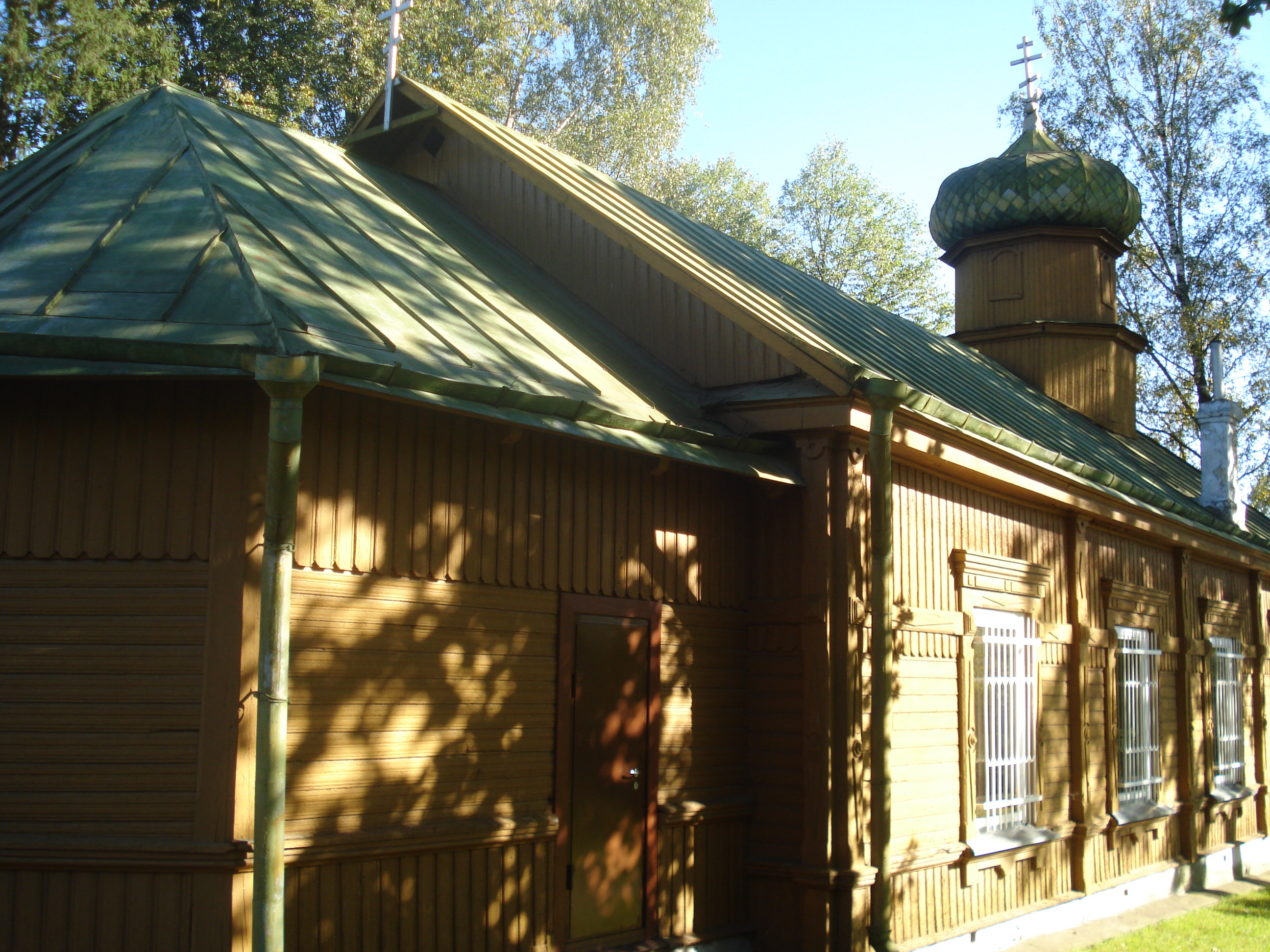 Russian Orthodox Church of St. Peter and St. Paul in Naujoji Vilnia (A. Kojelavičiaus g. 148)